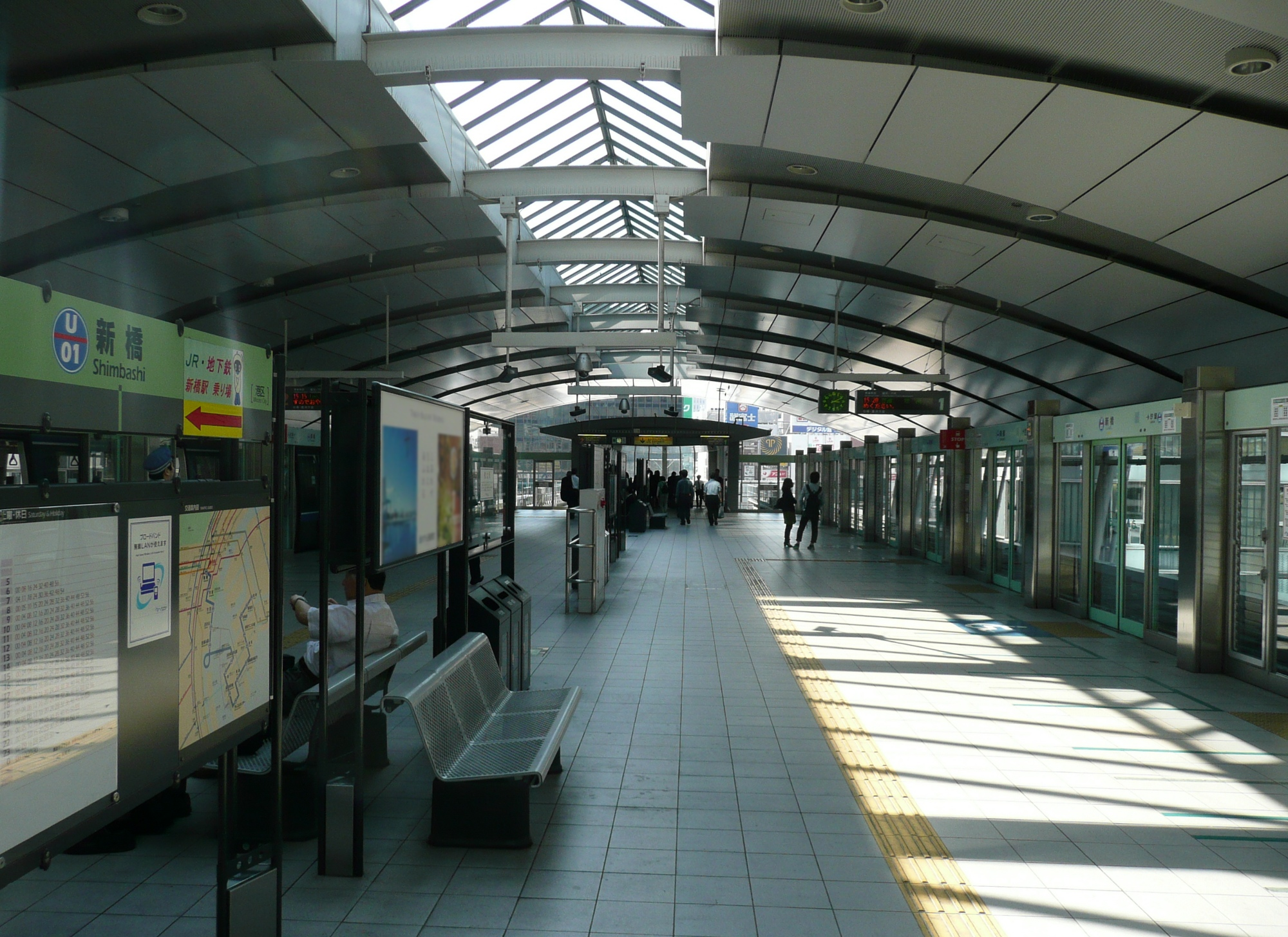 ゆりかもめ新橋駅ホーム